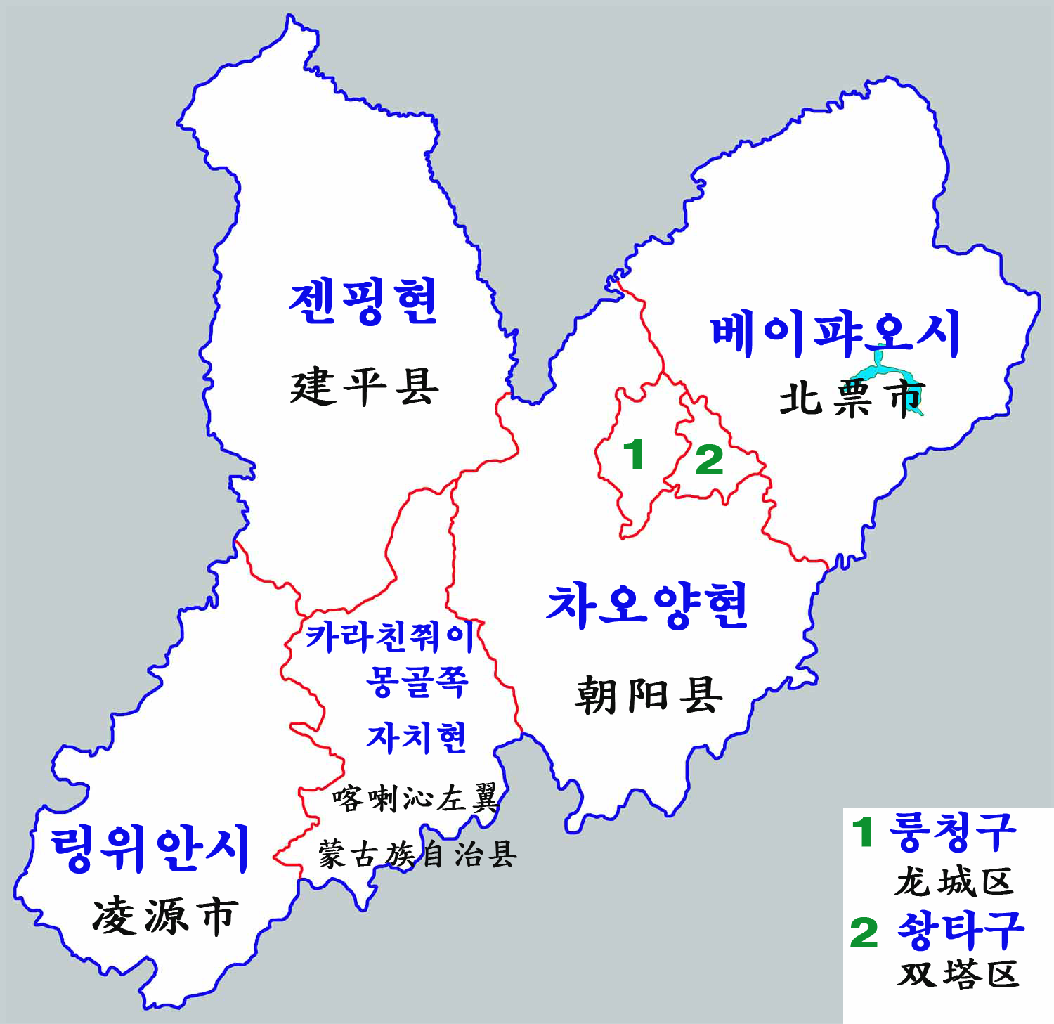 차오양시 현급구역도